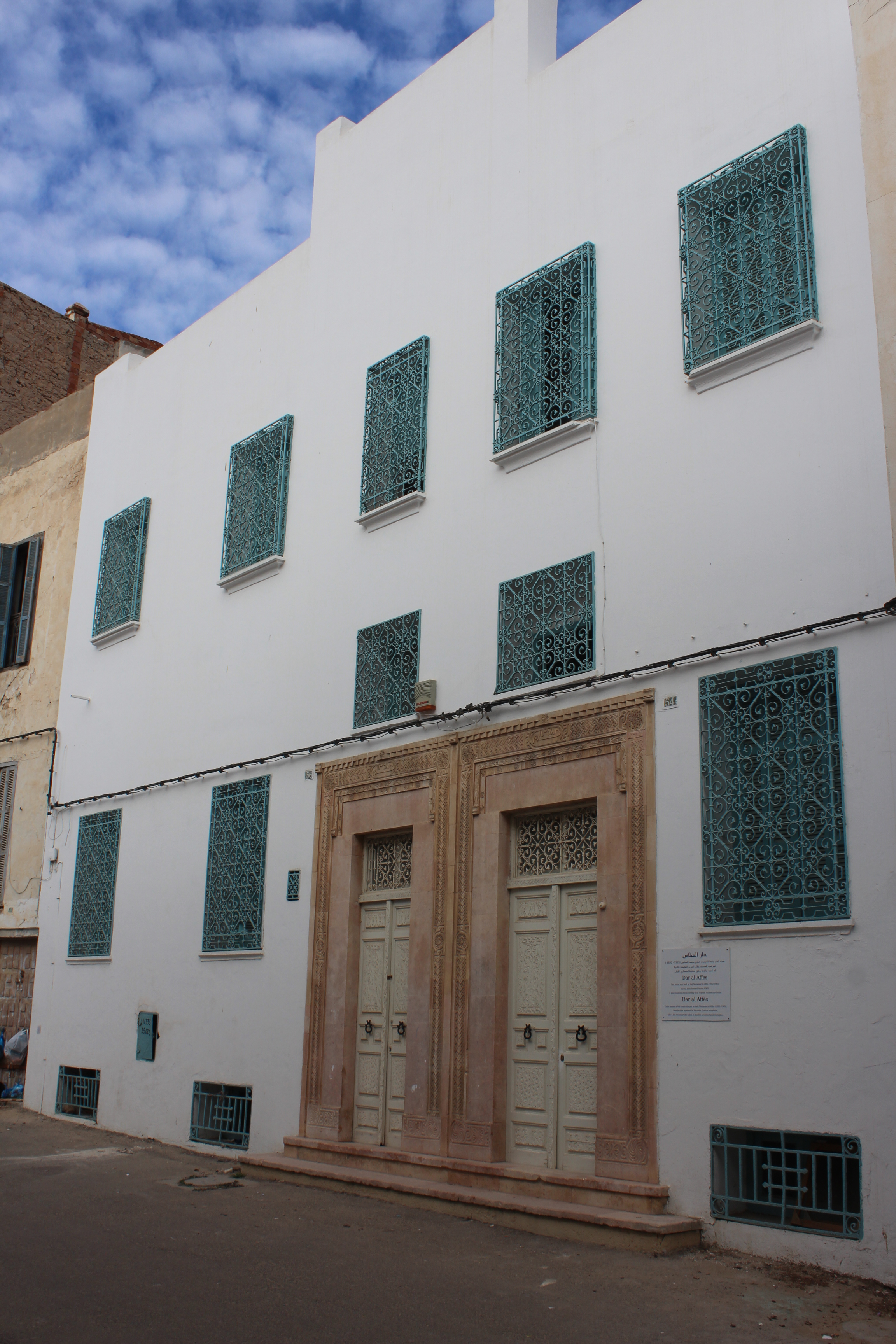 Facade de Dar Affes